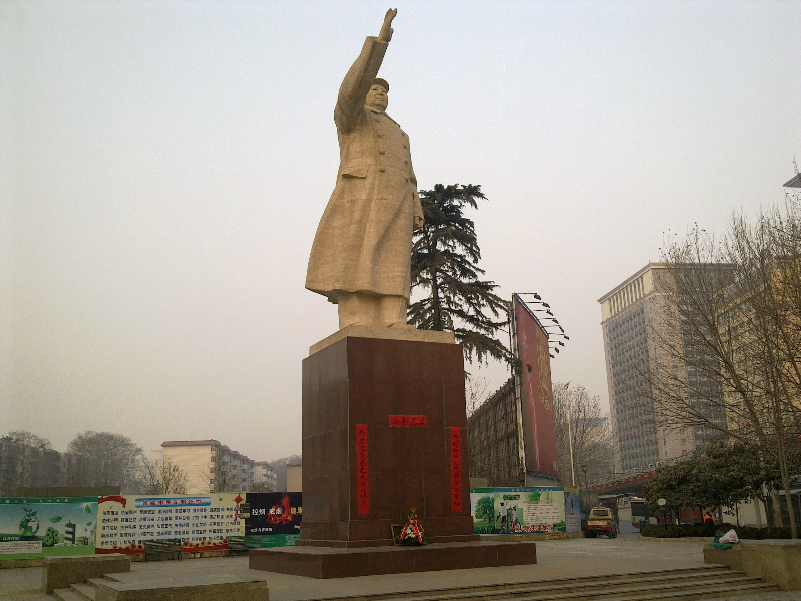 毛主席塑像